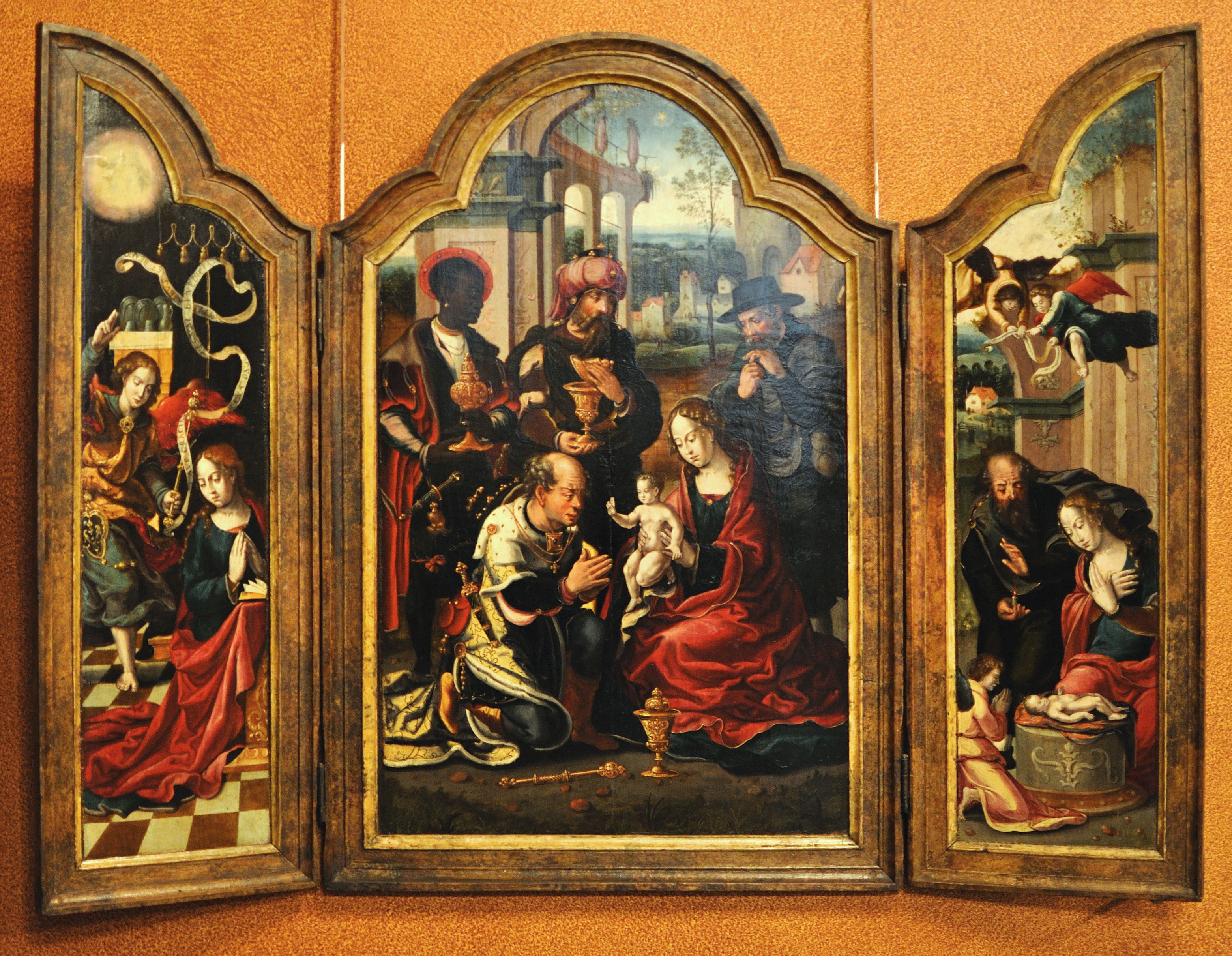 Triptyque